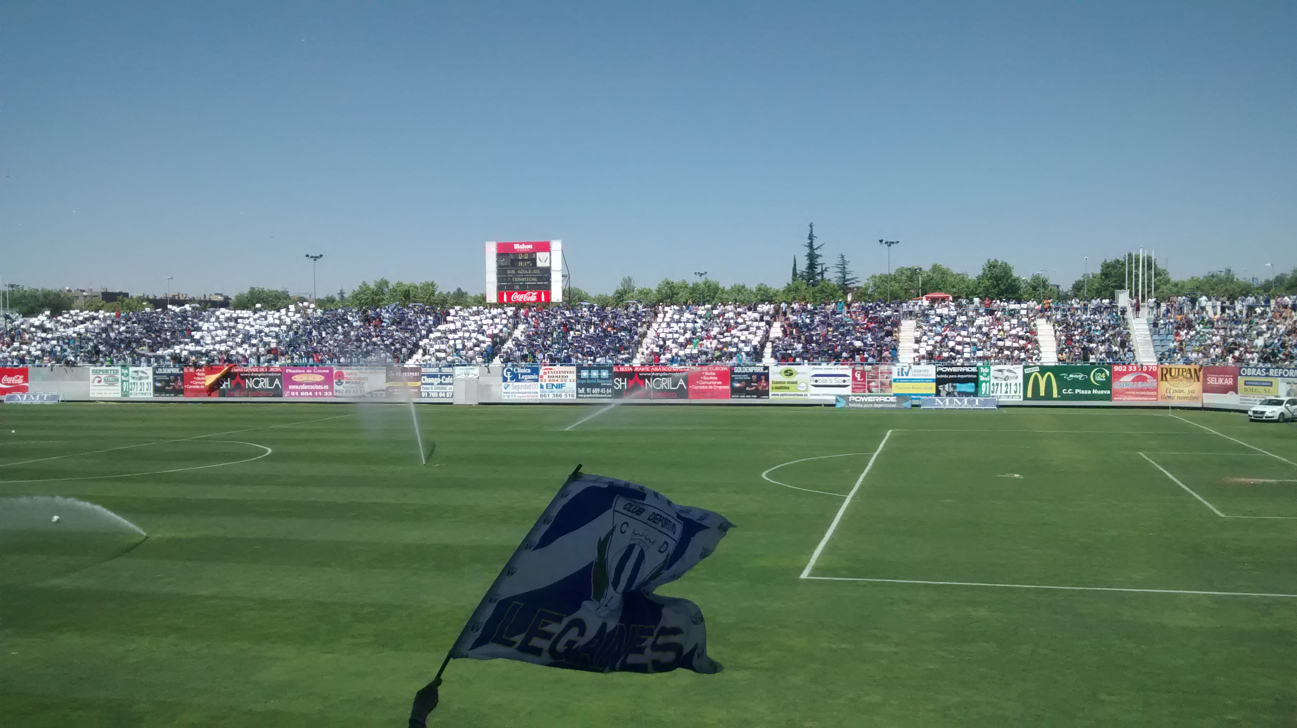 Partido de ida de la final de ascenso